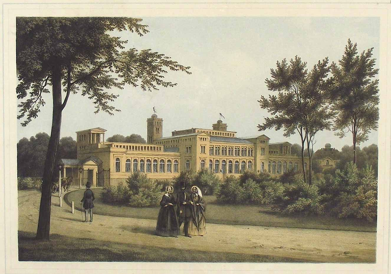 Kroll's Wintergarten in Berlin. Um 1850. Aus: L. E.Lütke. Album von Berlin und Potsdam.